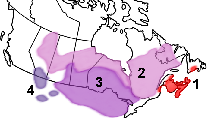 Algonquiens de l'Est Algonquiens du Nord ou du Subarctique Algonquiens du Centre Algonquiens de l'Ouest